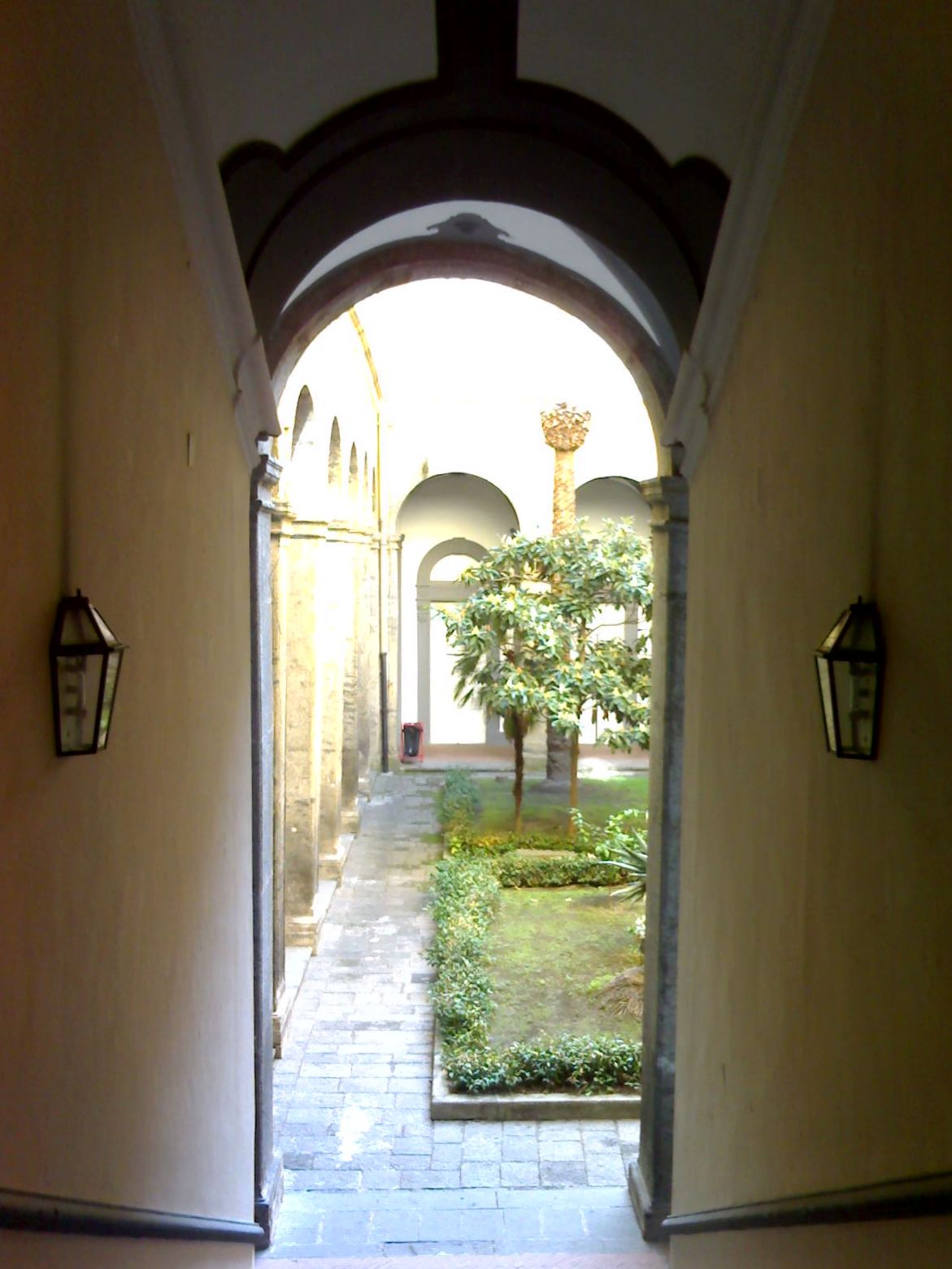 Chiostro piccolo del conservatorio di San Pietro a Majella (Napoli)